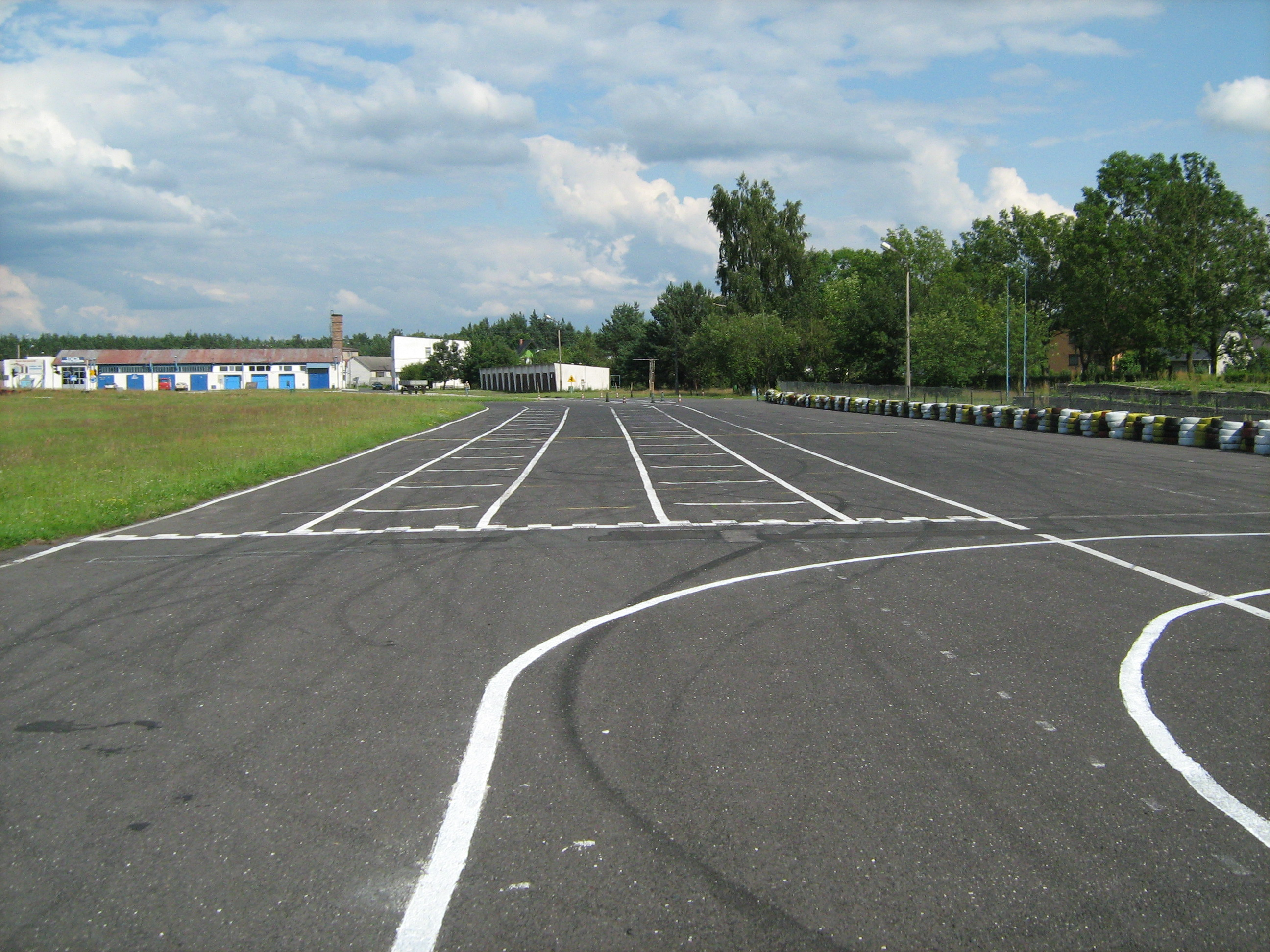 Tor kartingowy w Biłgoraju.